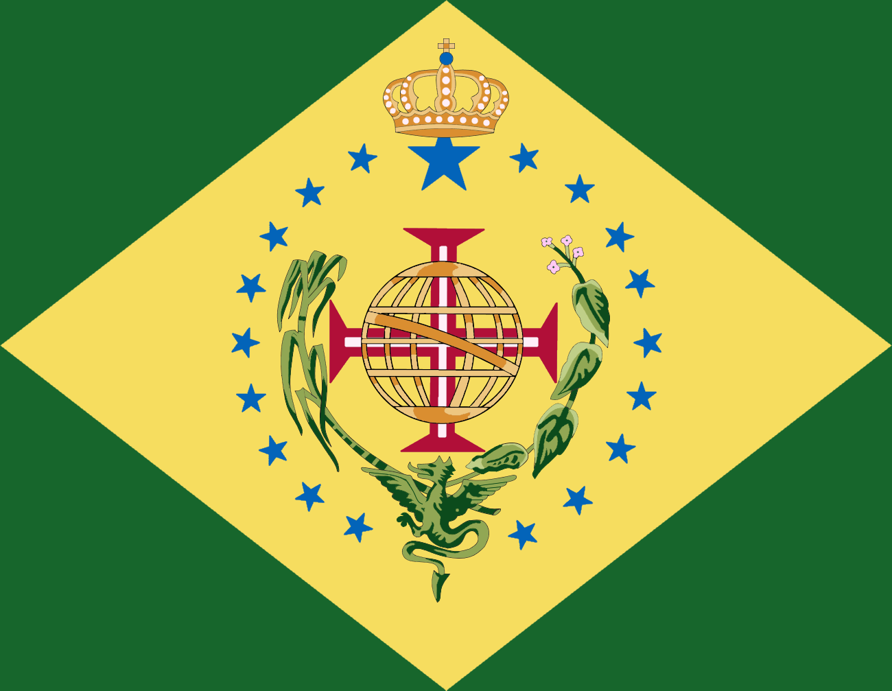 Encomendada por D. João VI, e com ajuda de José Bonifácio, esse rascunho deu origem ao uso das cores verde e amarelo na bandeira, alem do famoso formato de losango. Essa é uma reprodução da imagem encontrada no livro de Milton Luz - A História dos Símbolos Nacionais (p. 61).